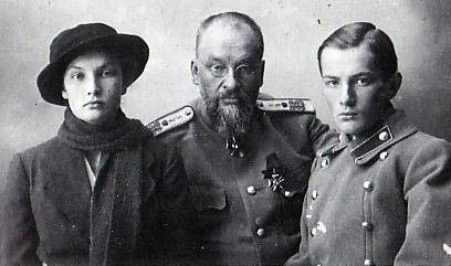 1918年春に監禁地のトボリスクで撮影。エフゲニー・ボトキンと彼の娘タチアナ、息子グレブ Доктор Боткин, с Татьяной и Глебом, 1918 год.